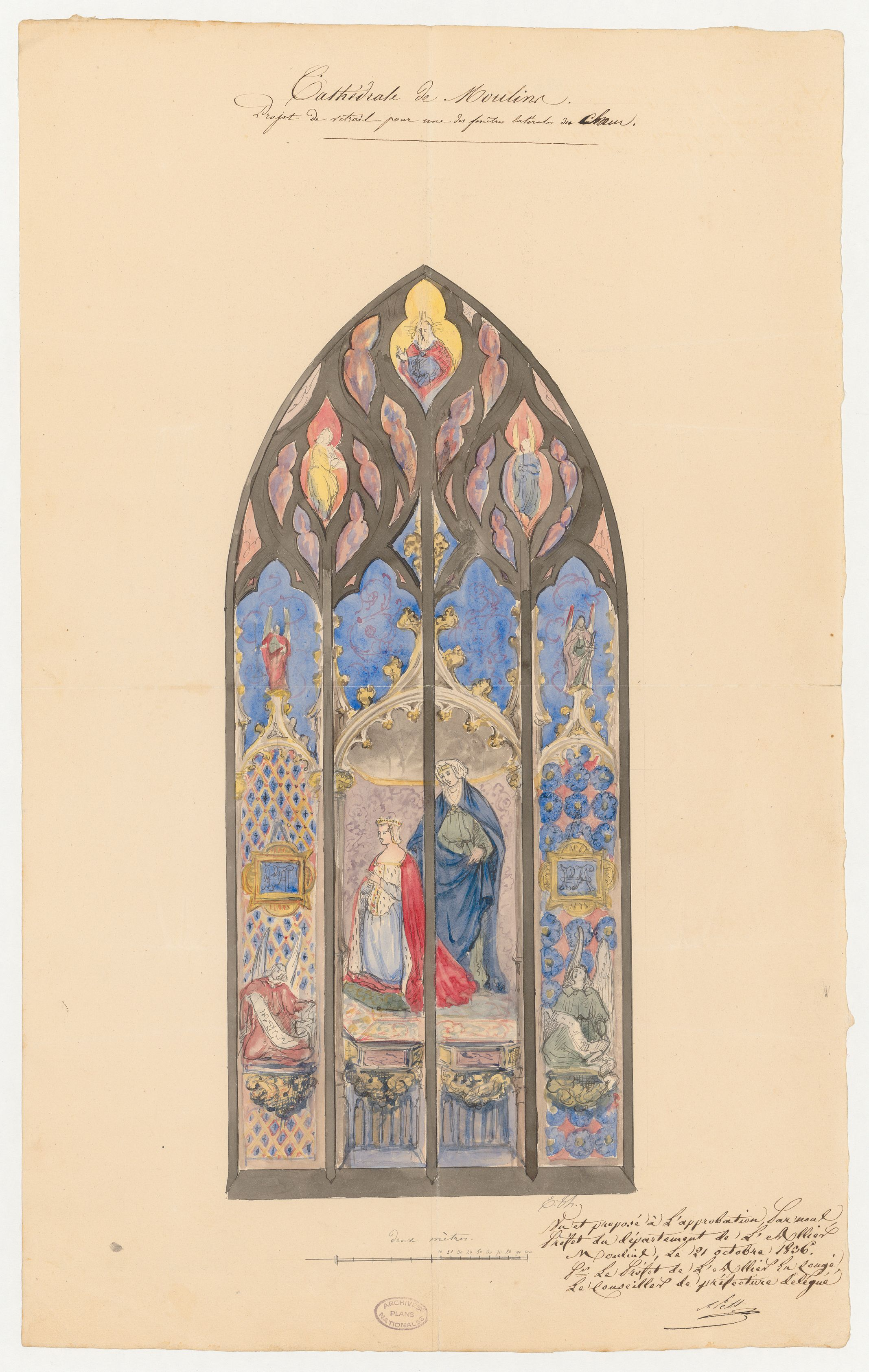 "Cathédrale de Moulins. Projet de vitrail pour une des fenêtres latérales du chœur". Dessin d'architecture issu des dossiers de travaux de restauration des cathédrales (1802-1912), conservés aux Archives nationales (inventaire et autres documents numérisés consultables en ligne).